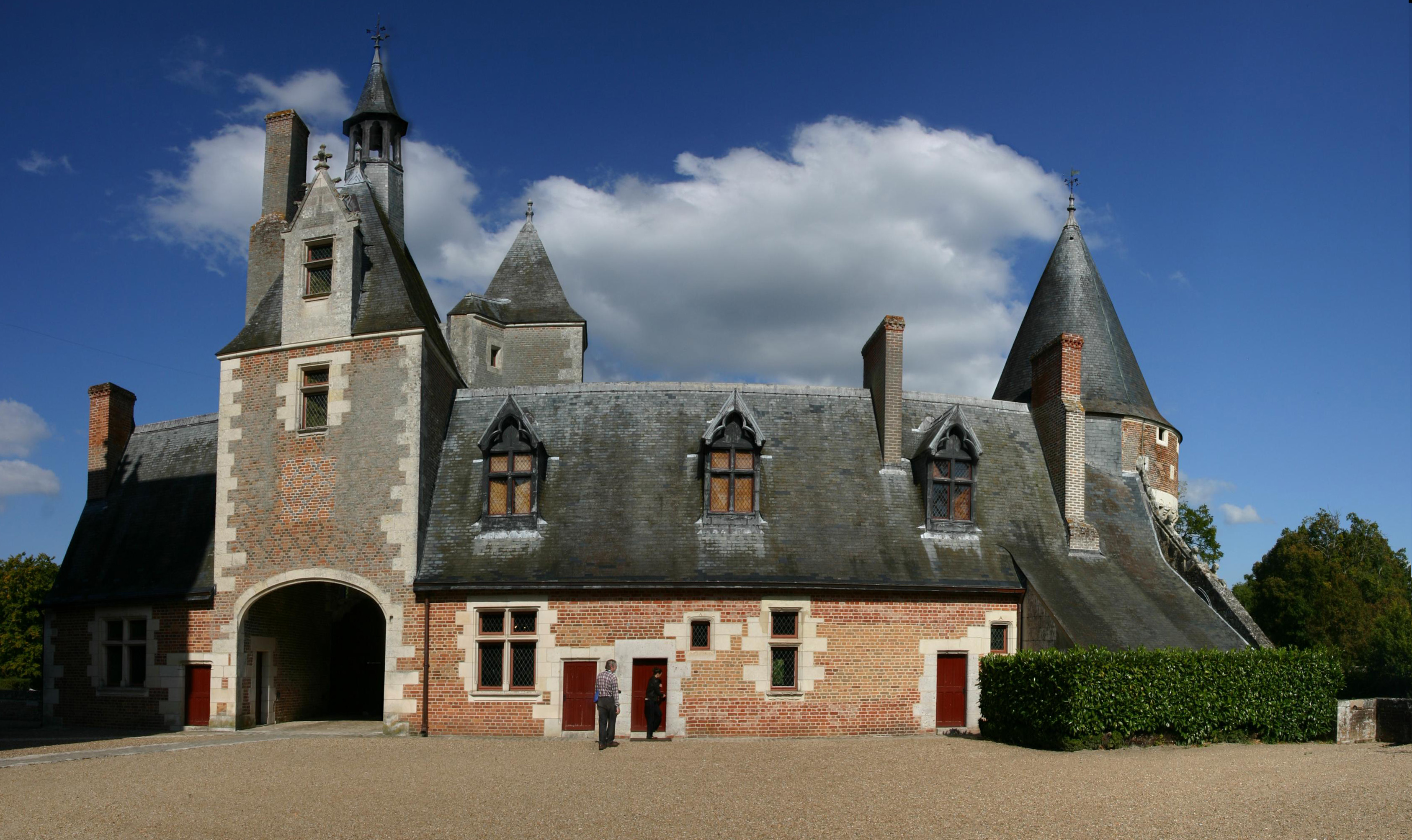 Schloss Le Moulin